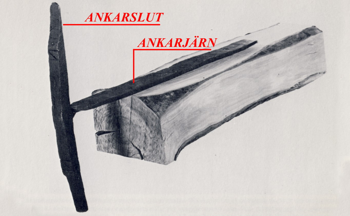 Medeltida murankare, smidd i ett stycke, som användes i t.ex. Gamla stan